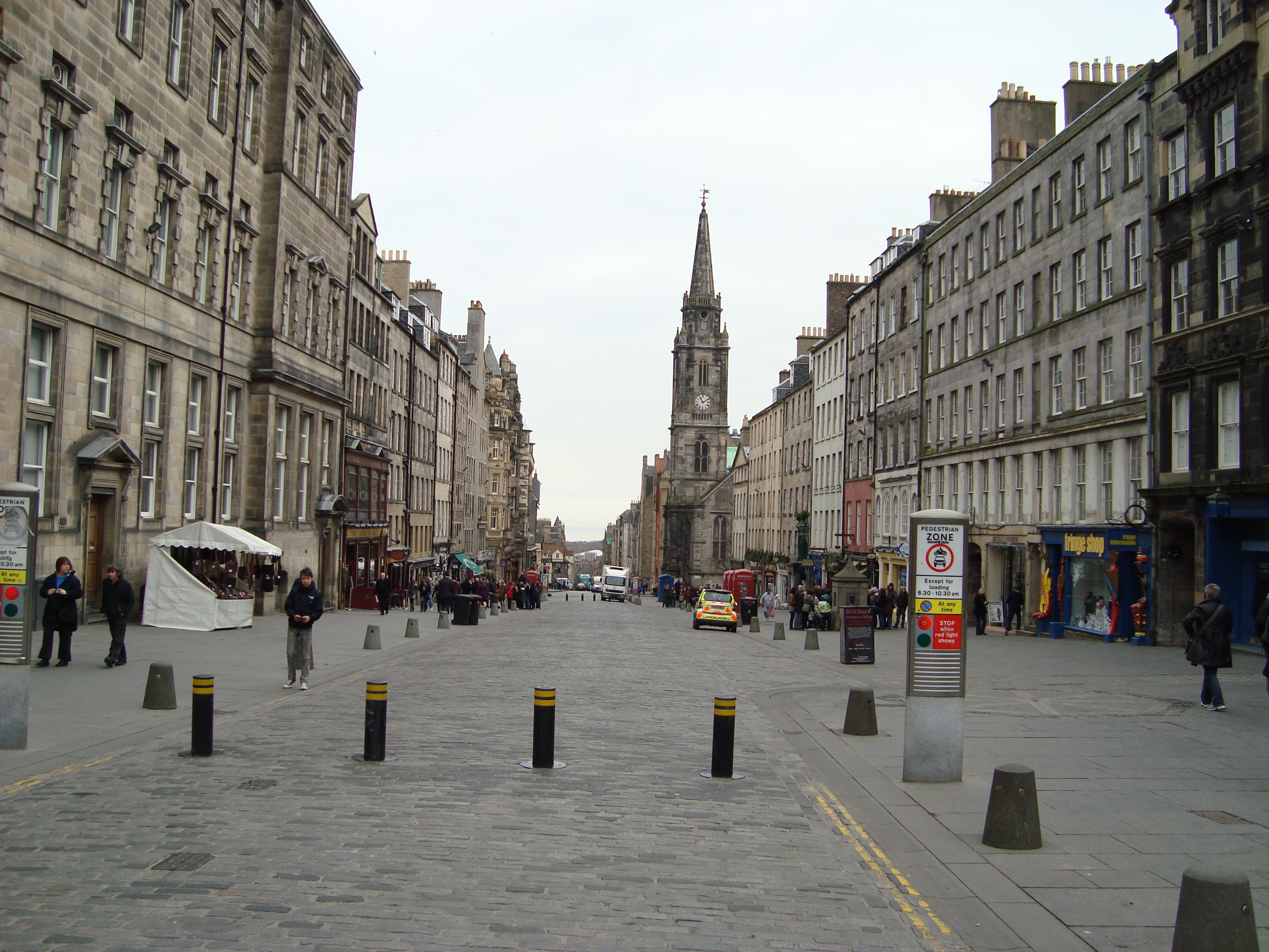 Edinburgh